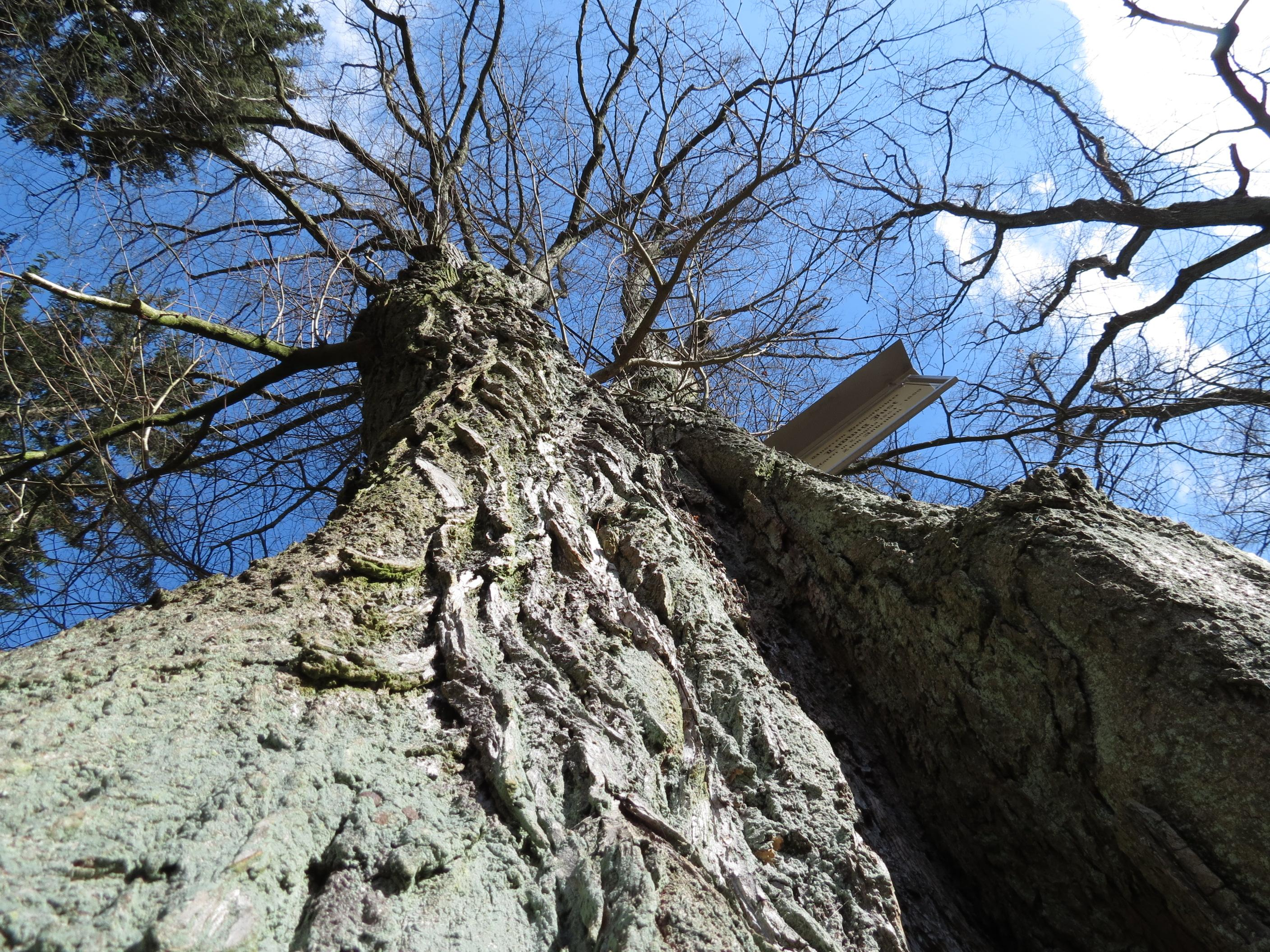 Lehdebornlinde westlich von Langula im Hainich.